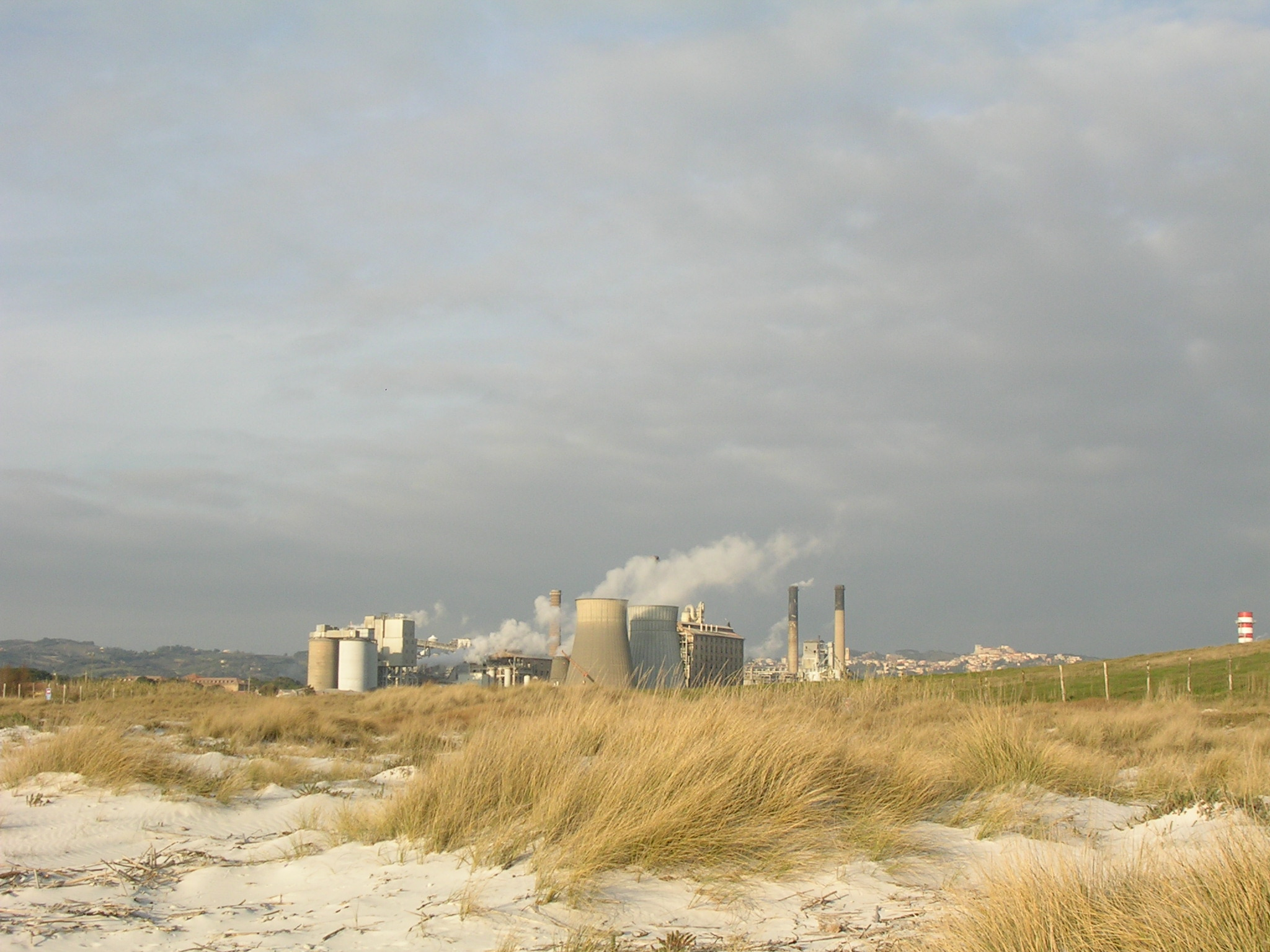 Rosignano Solvay: le industrie Solvay viste dalla spiaggia.